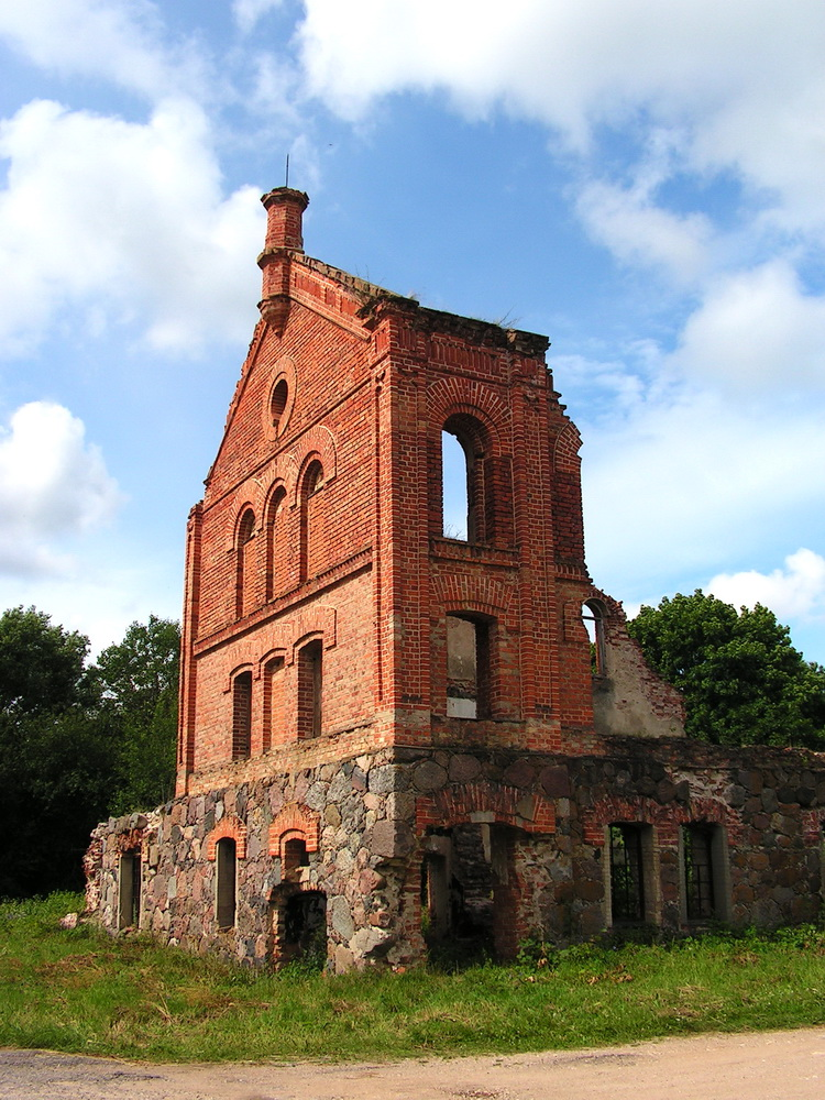 Беларуская (тарашкевіца): Руіны бровара (Шэметава, Беларусь).